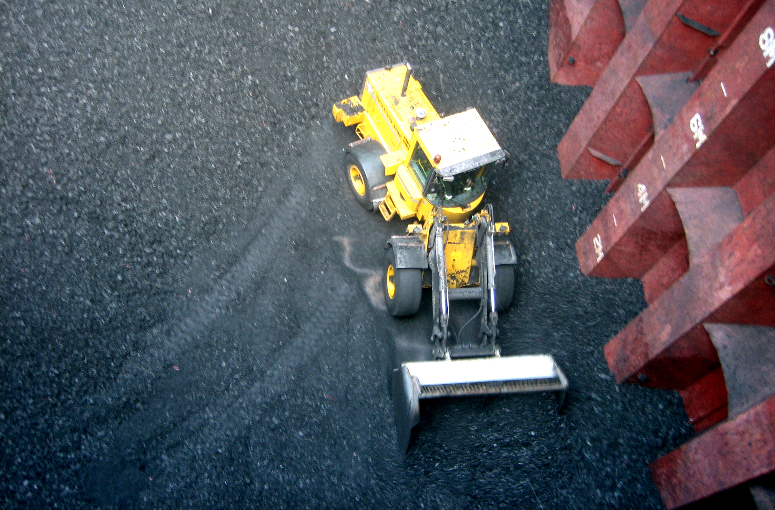 Når lasterommet på Darin Naree begynner å nærme seg tomt, løfter havnevesenet om bord en hjullaster for å skrape trekullet fra sidene av lasterommet mot midten, hvor krana kan få tak i det.